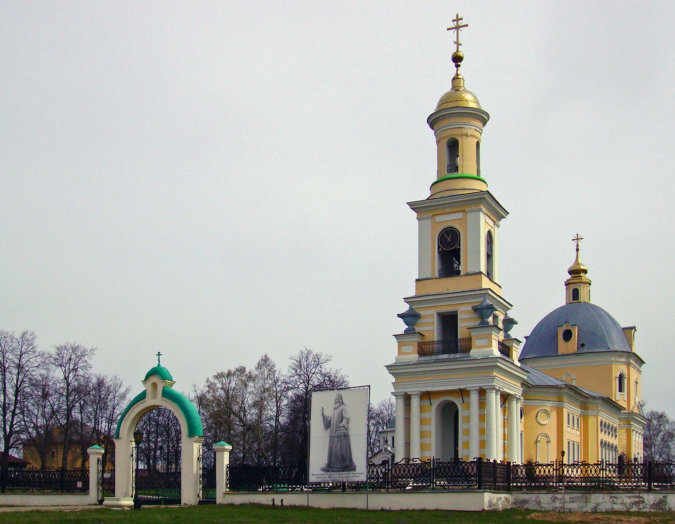 Выкса. Рождественская церковь